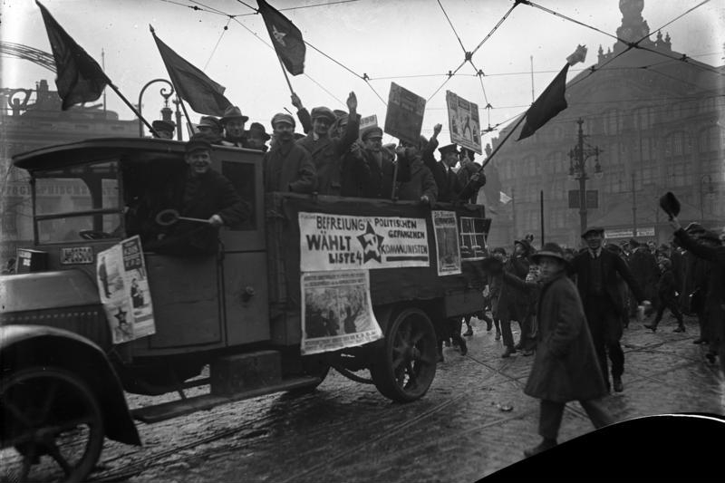 Der Wahlsonntag in Berlin, welcher mit großen Propaganda-Aufzügen von jeder Partei aus betrieben wurde. Propaganda-Autos der Kommunistischen Partei beim Ueberqueren des Alexanderplatzes.